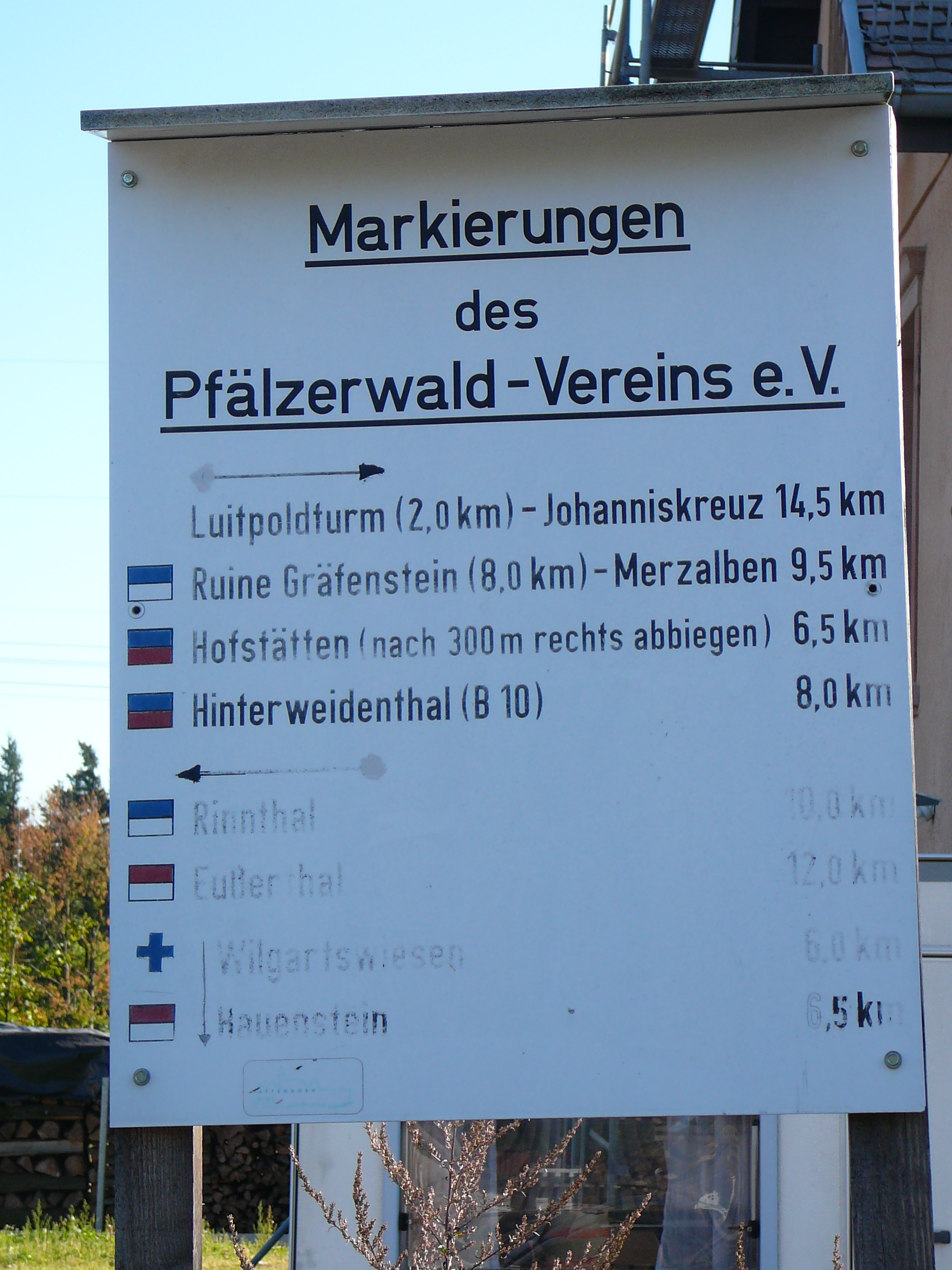 Markierte Wanderwege des Pfälzerwald-Vereins im Weißenberggebiet (Hermersbergerhof)